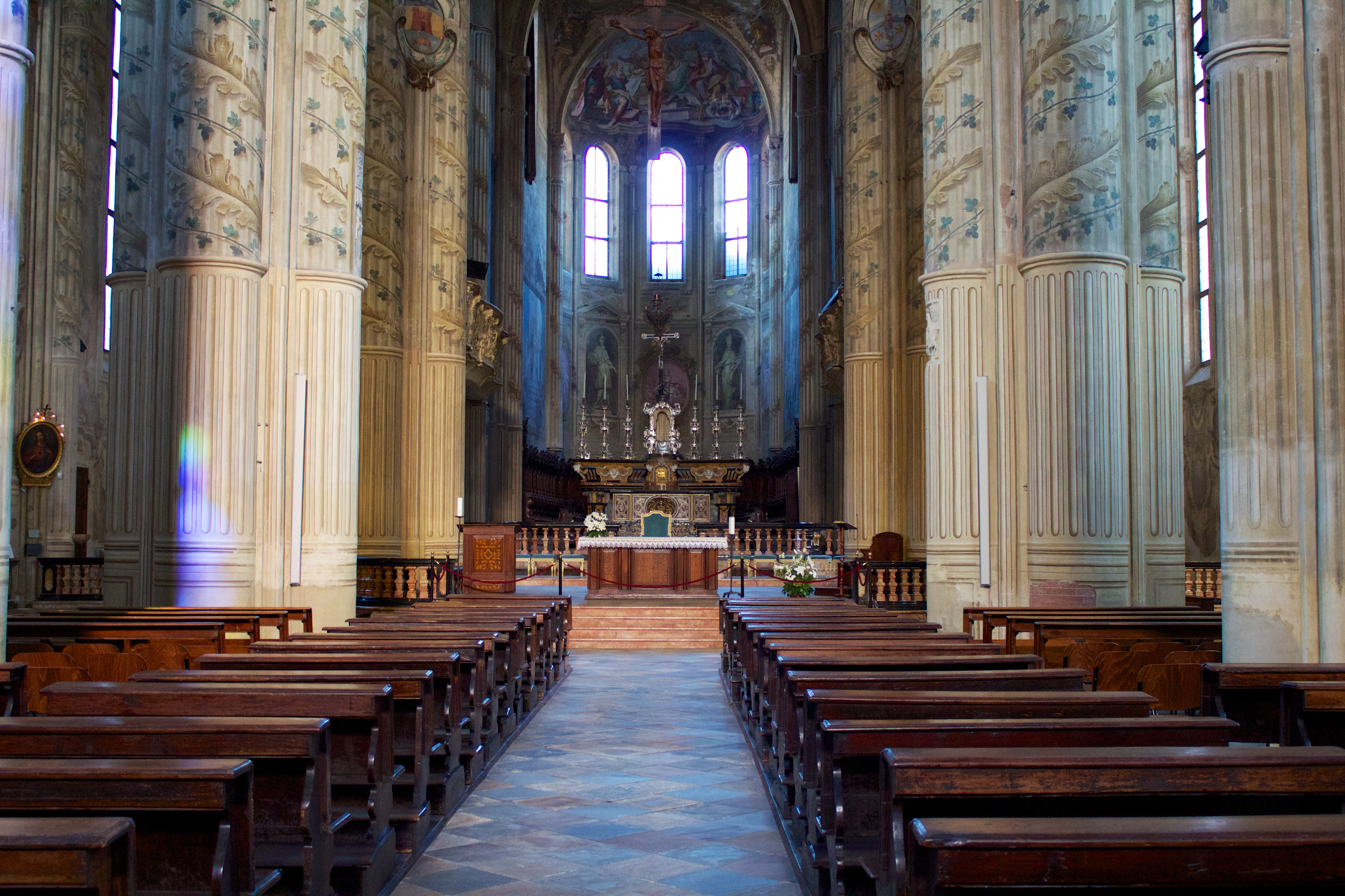 Navata del Duomo di Asti